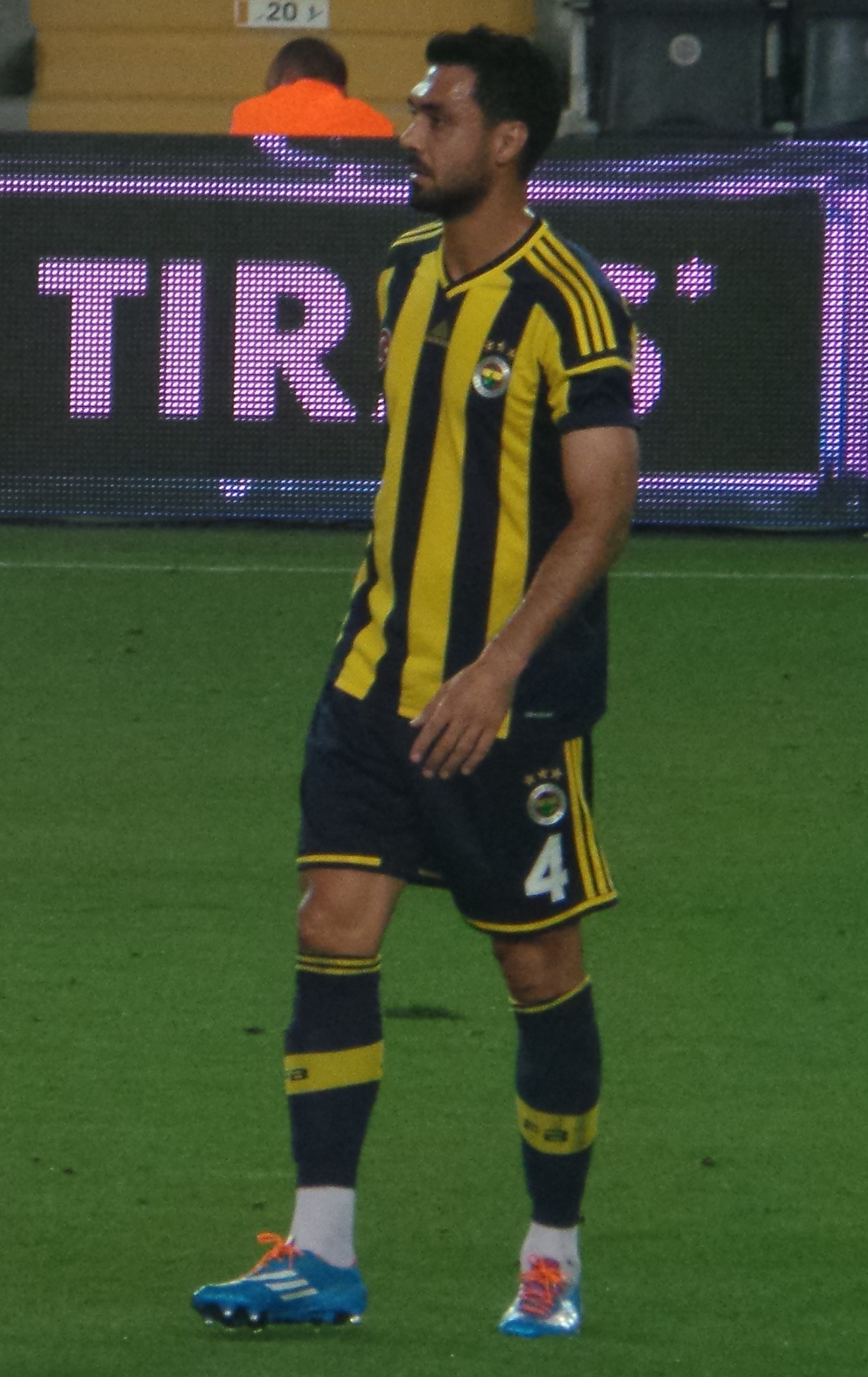 Bekir İrtegün SOMA